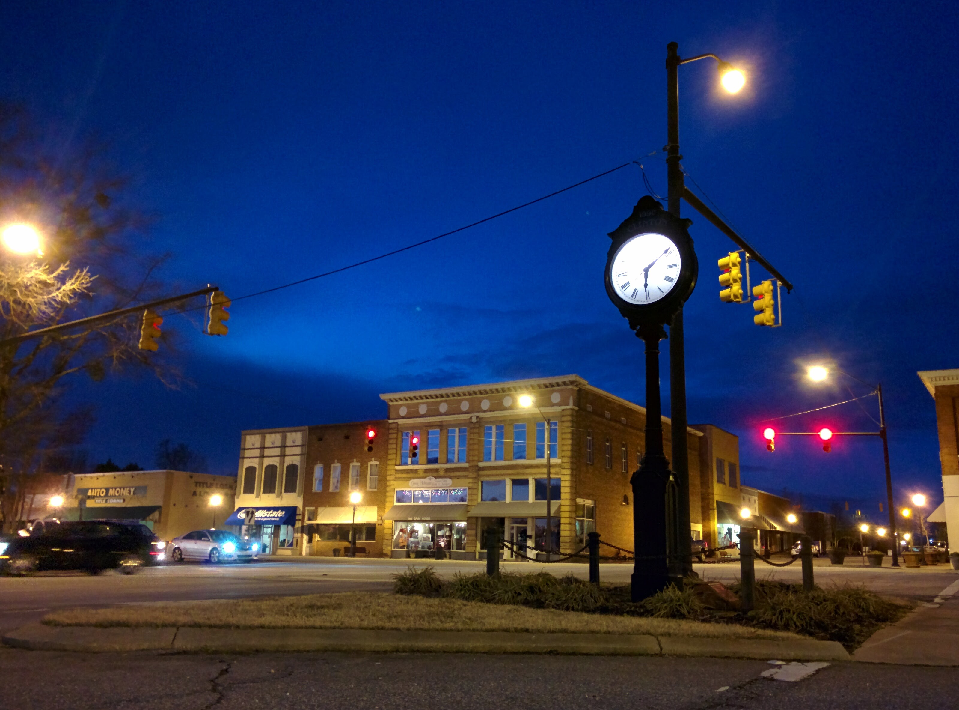 Downtown Clinton, by Xiaorui Du